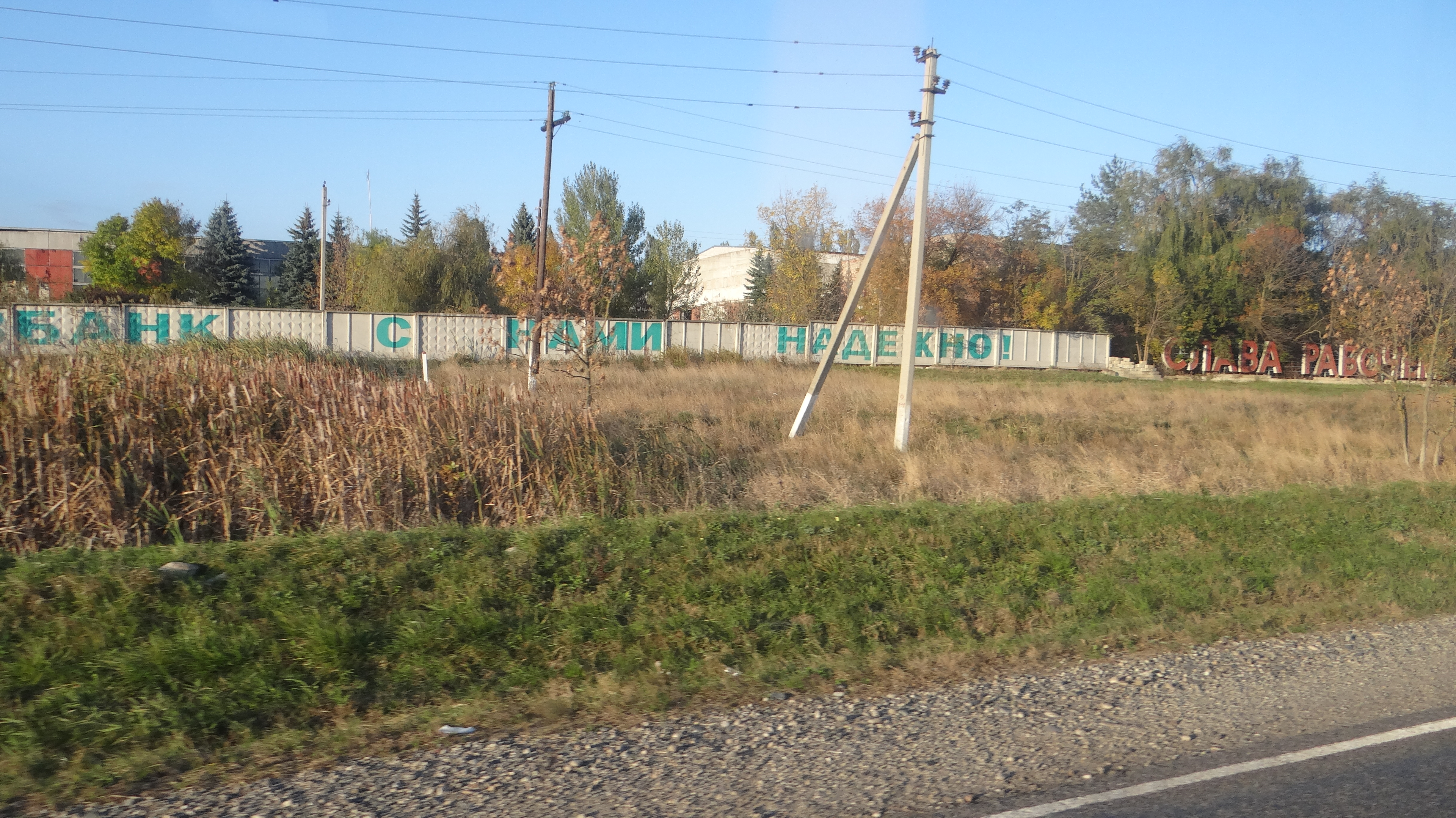 Kavkazskiy, Karachaevo-Cherkesskaya Republits, Russia, 369100